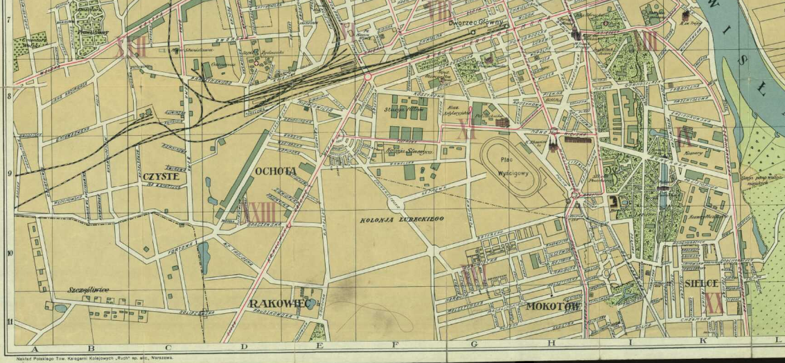 Fragment "Planu miasta stołecznego Warszawy". Warszawa : Nakład Polskiego Tow. Księgarni Kolejowych "Ruch" sp. akc., [1926] (Warszawa : Zakł. Graf. B. Wierzbicki i S-ka).